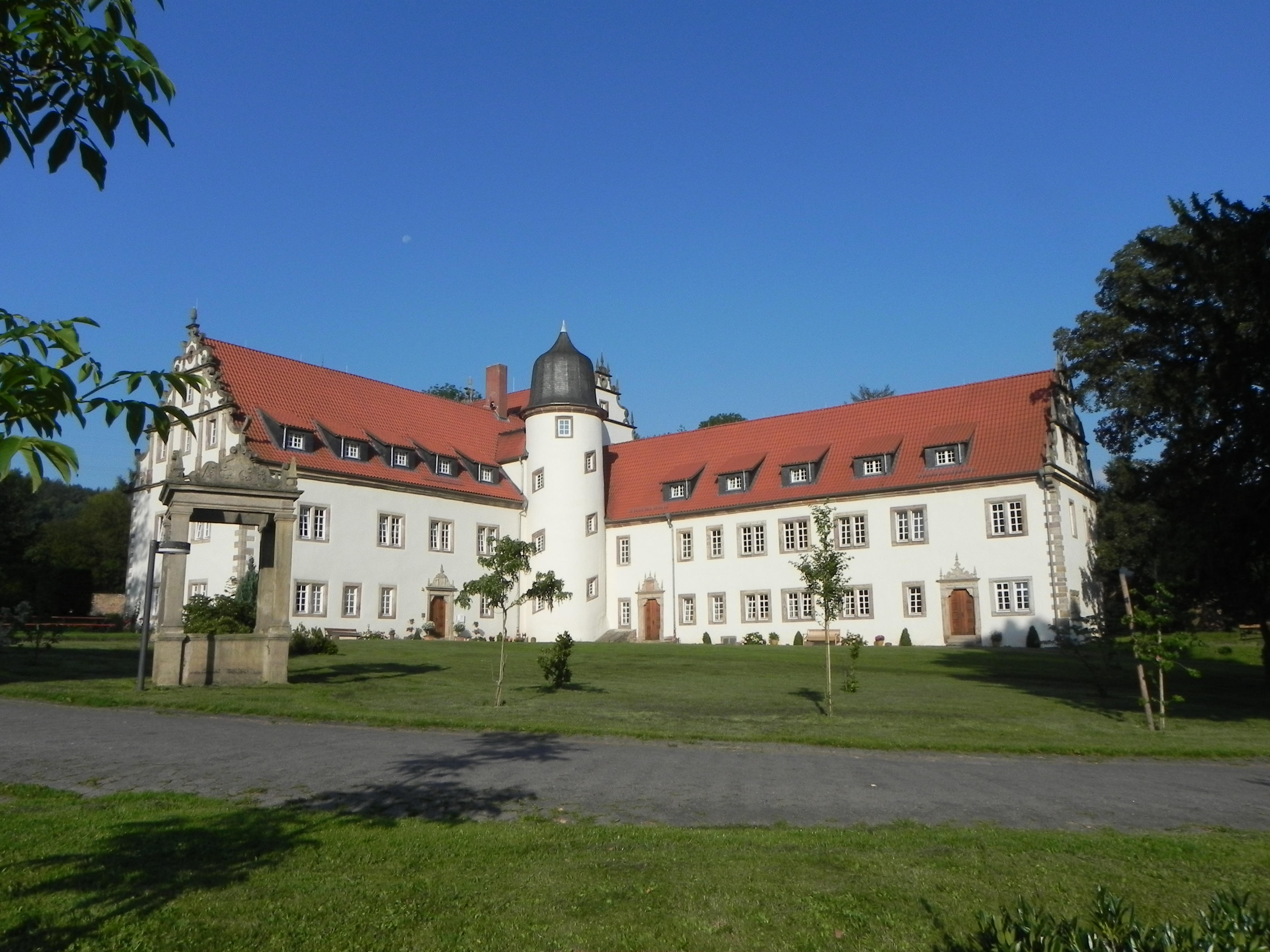 Schloss Buchenau